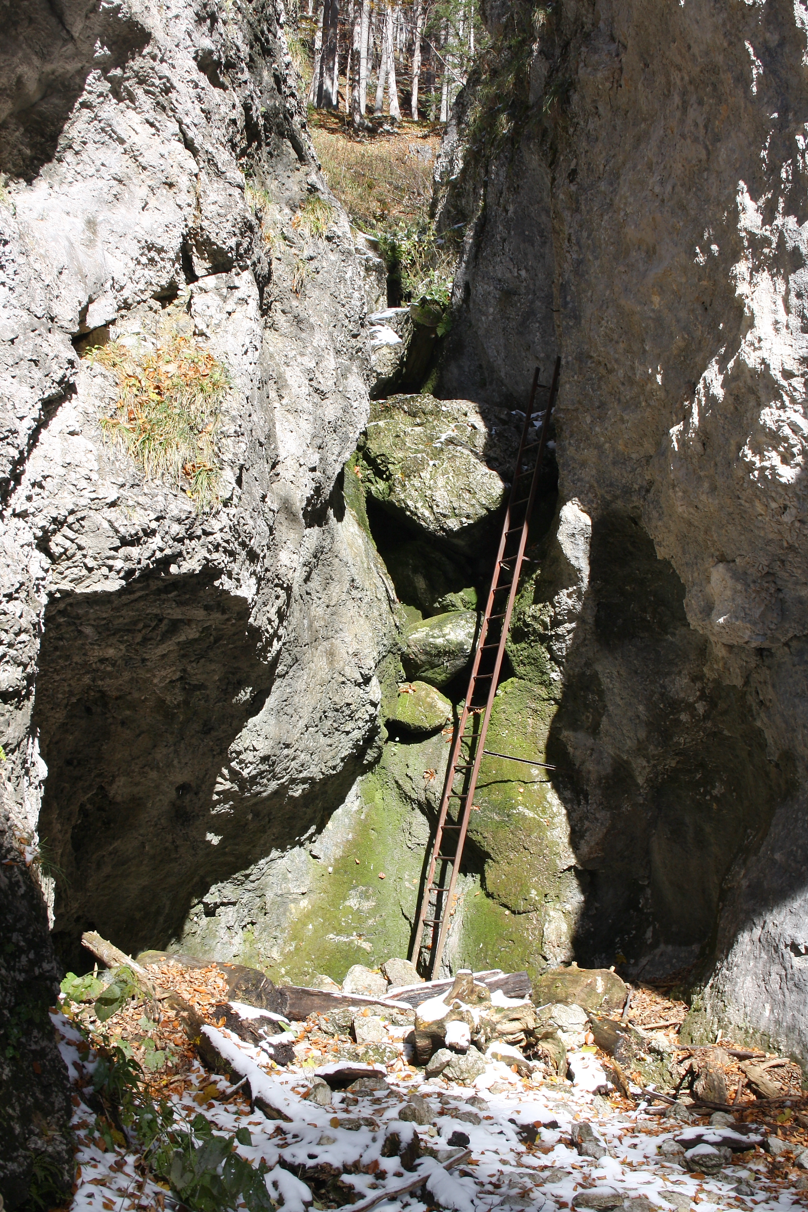 Eine weitere Leiter in der Weichtalklamm zu Beginn des letzten Drittels.